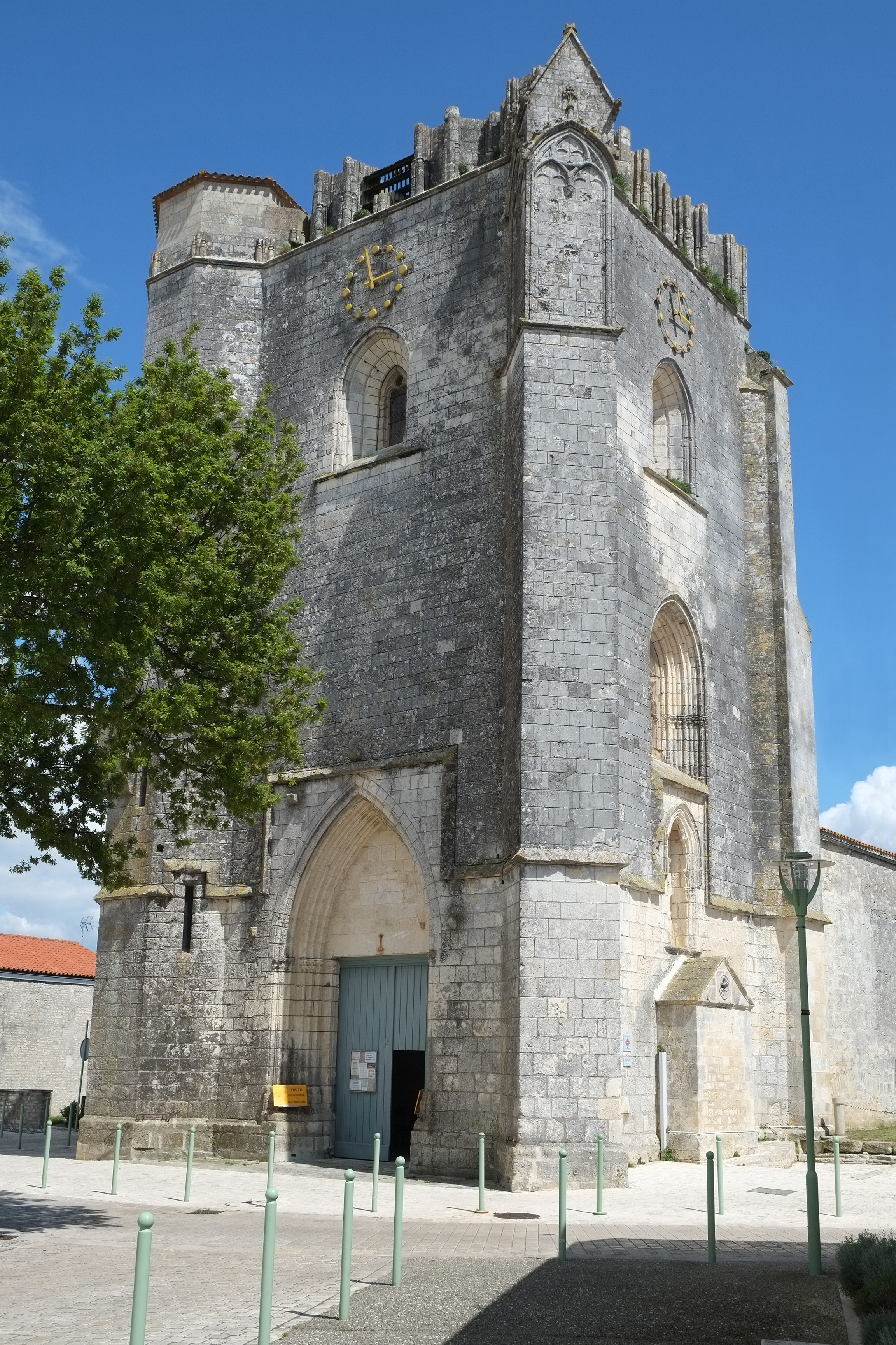 Clocher-porche de l'église Saint-Pierre Marsilly Charente-Maritime France